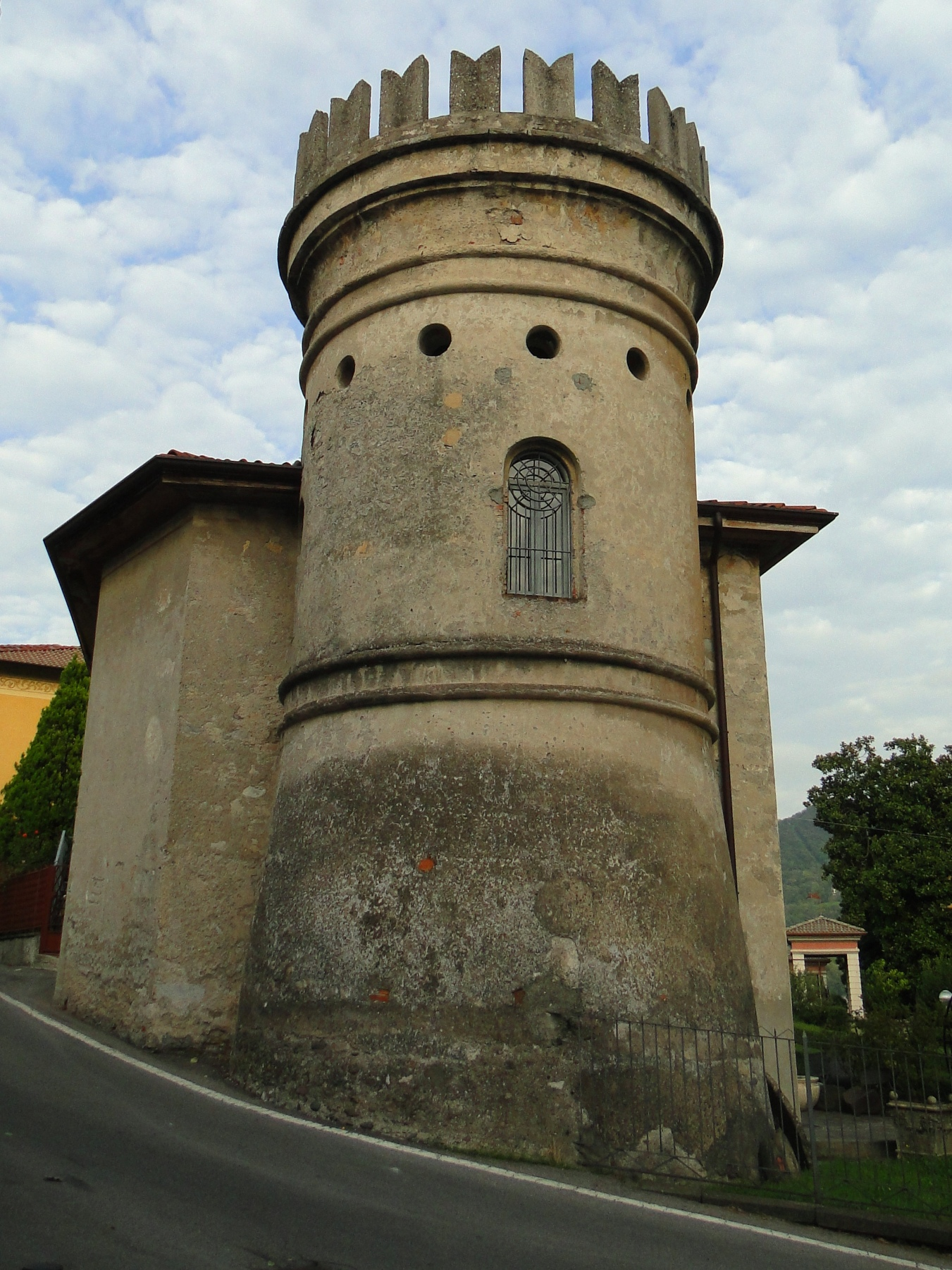 Comenduno, fraz. di Albino (BG), torre